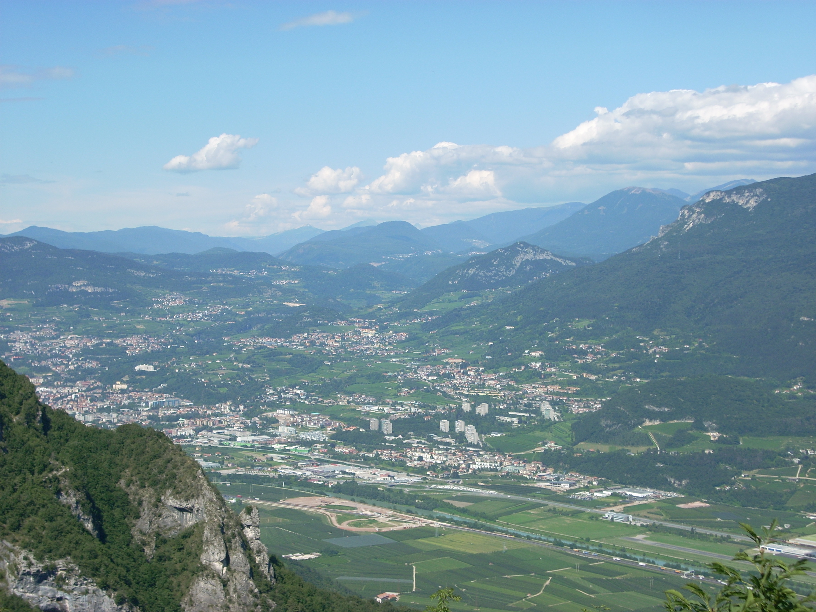 Trento e valle dell'Adige